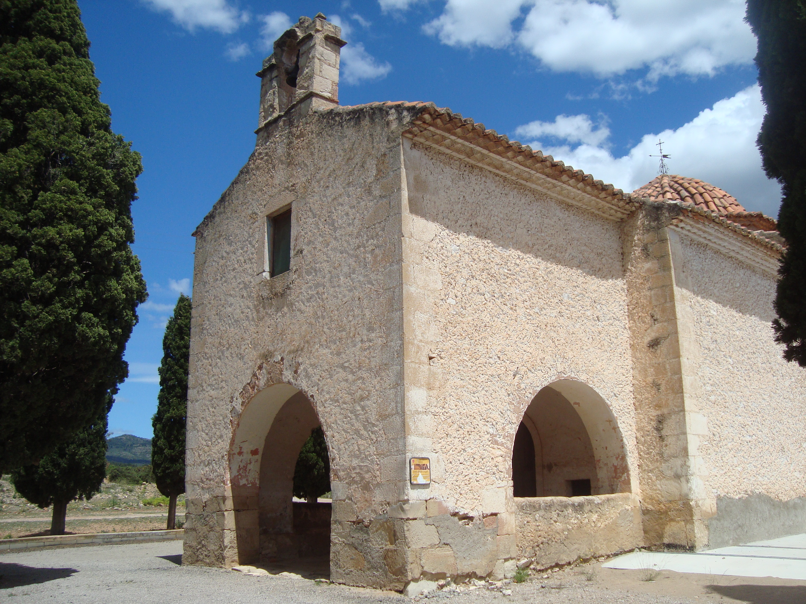 Ermita de Sant Gregori (Atzeneta del Maestrat) 04.001-002.